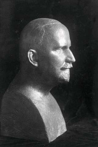 Museumsdirektør Hans Aall. Bysten er utført av Gustav Vigeland og ble avduket utenfor kontorbygget på Norsk Folkemuseum på Aalls 60-års dag i 1929. Foto Jenny Arnesen, Norsk Folkemsueum.